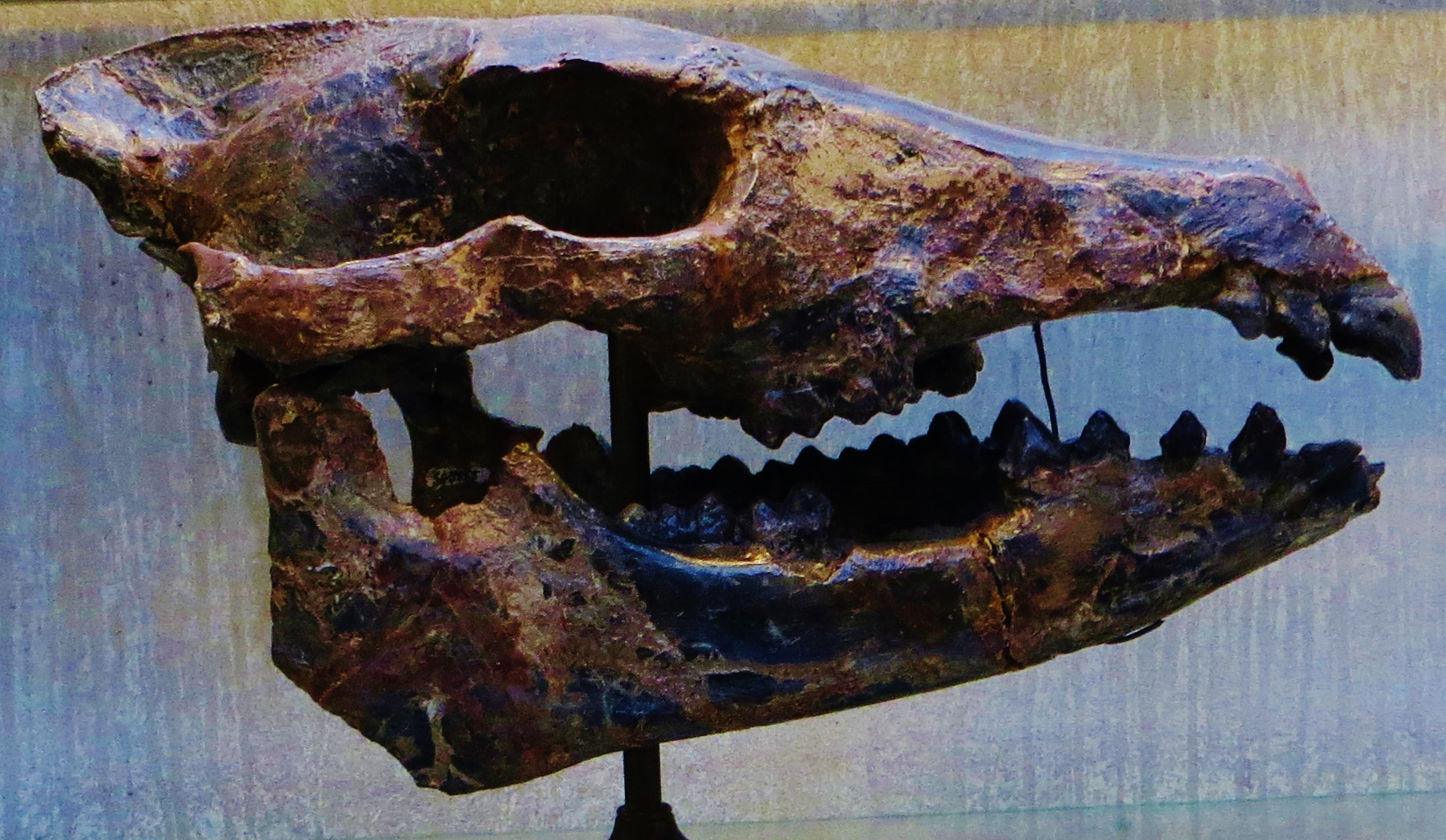 Fossil of Hyoytherium, an extinct mammal- Took the photo at Musee d'Histoire Naturelle, Paris